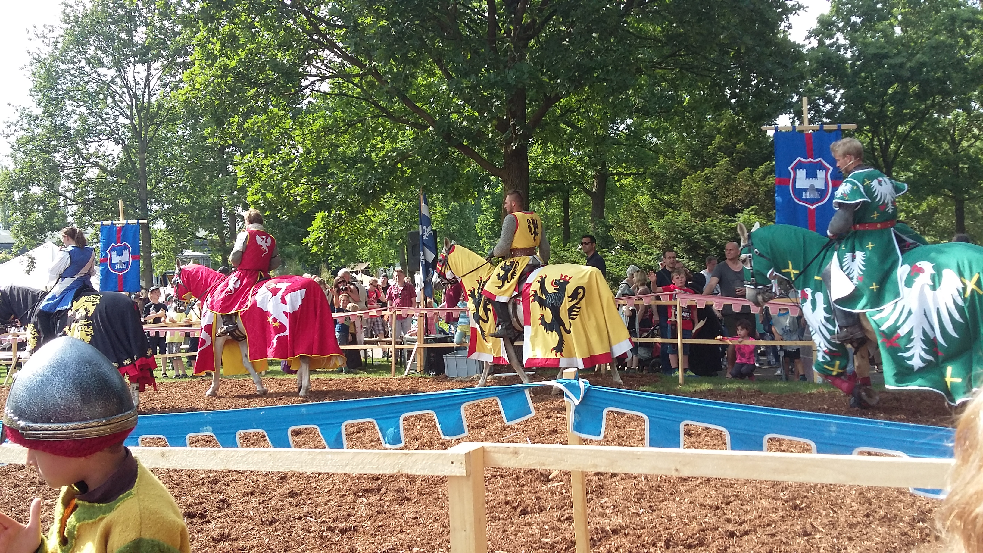 Pfingst Spektaklum mit historischem ritterturnier, Schloß Broich - 03.05.2017